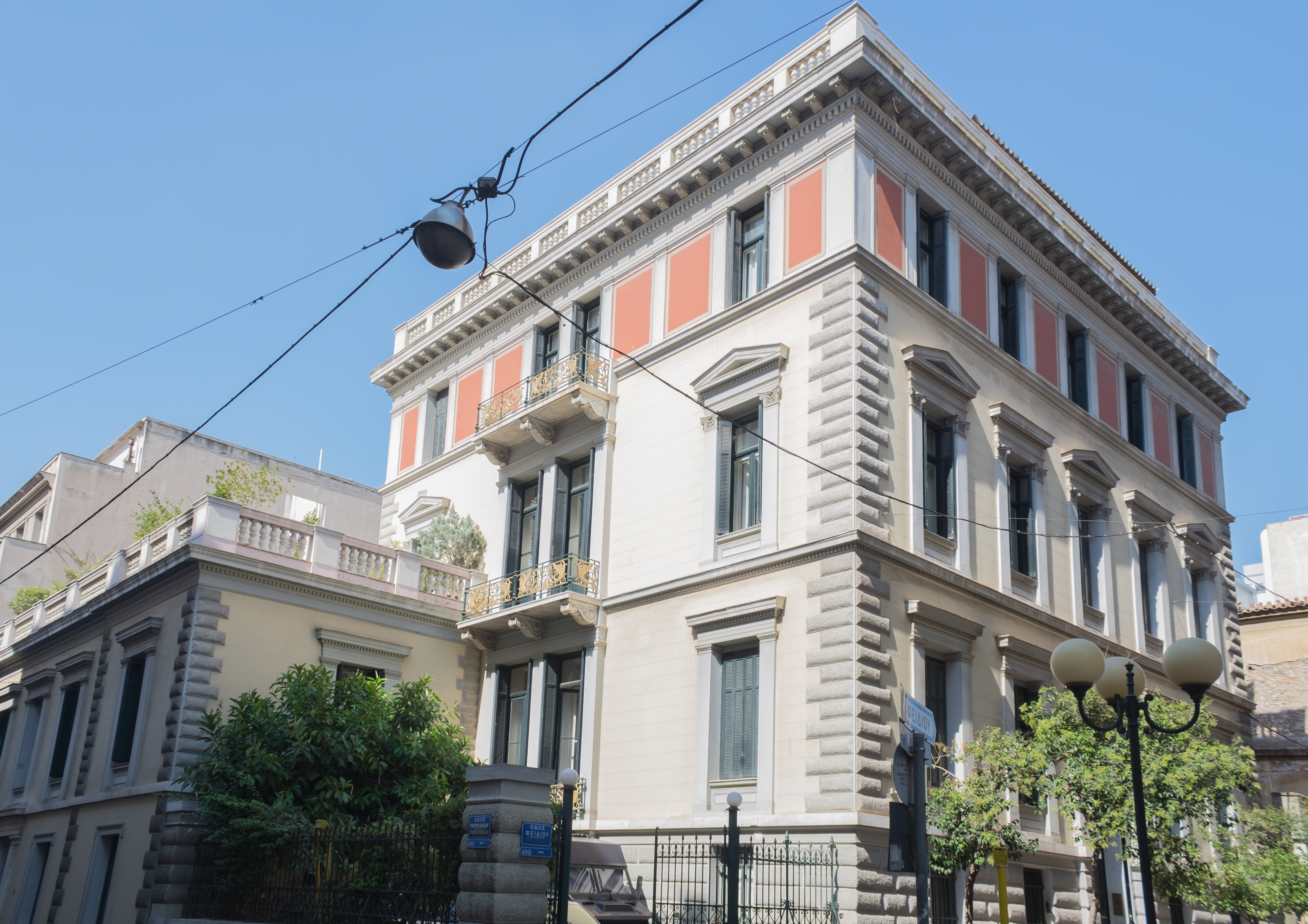 Γερμανικό Αρχαιολογικό Ινστιτούτο«Γερμανικό Αρχαιολογικό Ινστιτούτο»